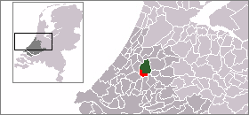 Location van de voormalige gemeente Benthuizen in de huidige gemeente Rijnwoude, provincie Zuid-Holland